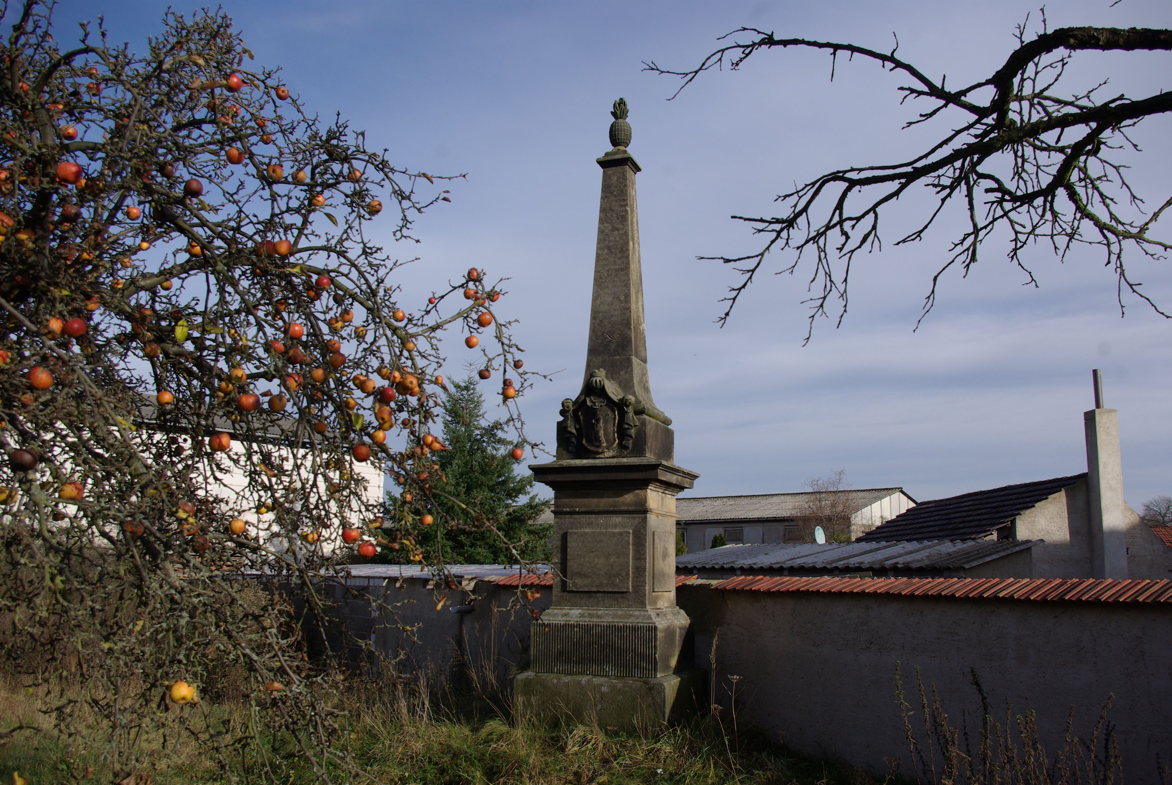 Niederer Fläming Ortsteil Meinsdorf. Die Gedenksäule erinnert an den Landerwerb von Gottfried Emanuel von Einsiedel im Jahre 1734. Die Säule steht unter Denkmalschutz.